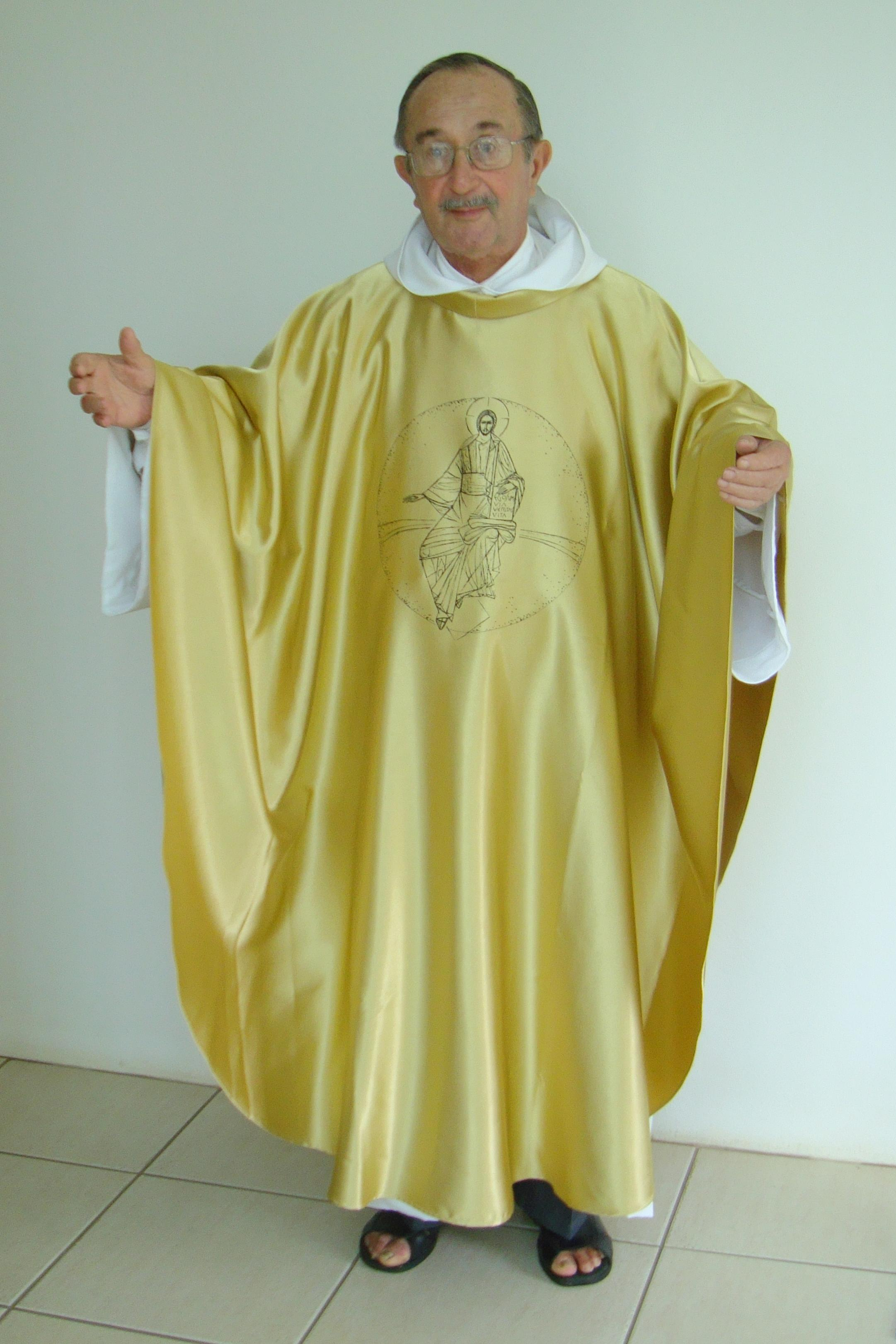 Padre Álvaro Lenhardt da Diocese de Santa Cruz do Sul com uma casula desenhada por Cláudio Pastro com imagem de Jesus Cristo.